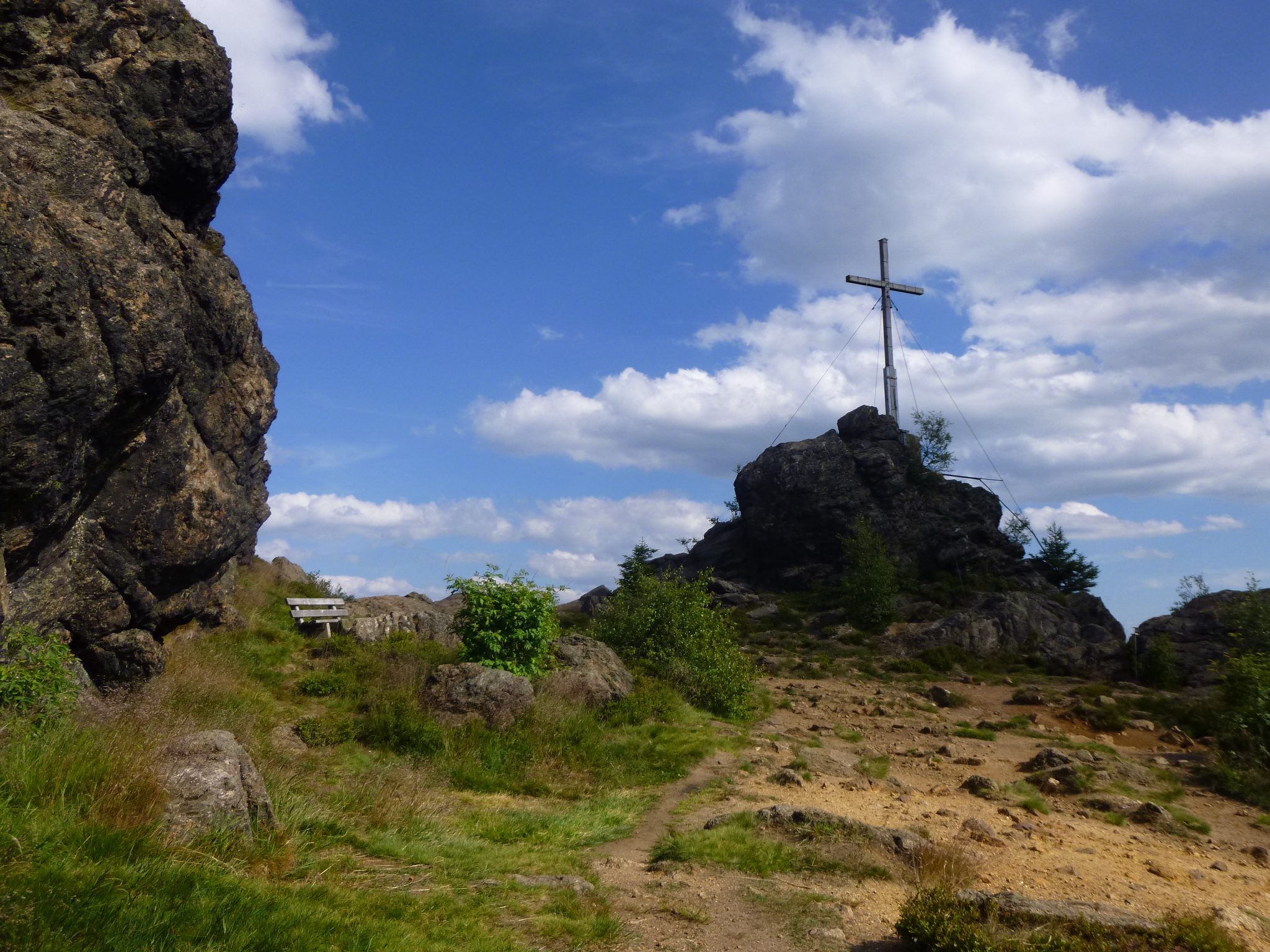 der Silberberg-Gipfel thront hoch über dem Urlaubsort Bodenmais